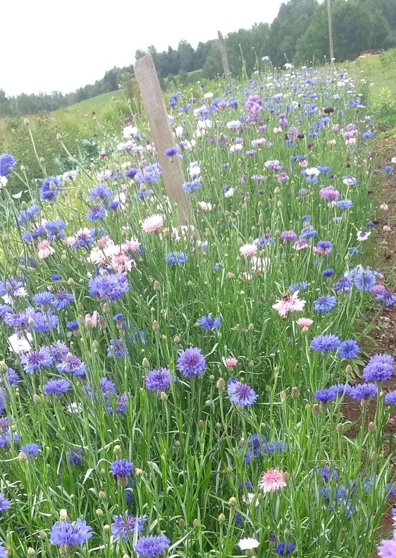 Culture des centaurées